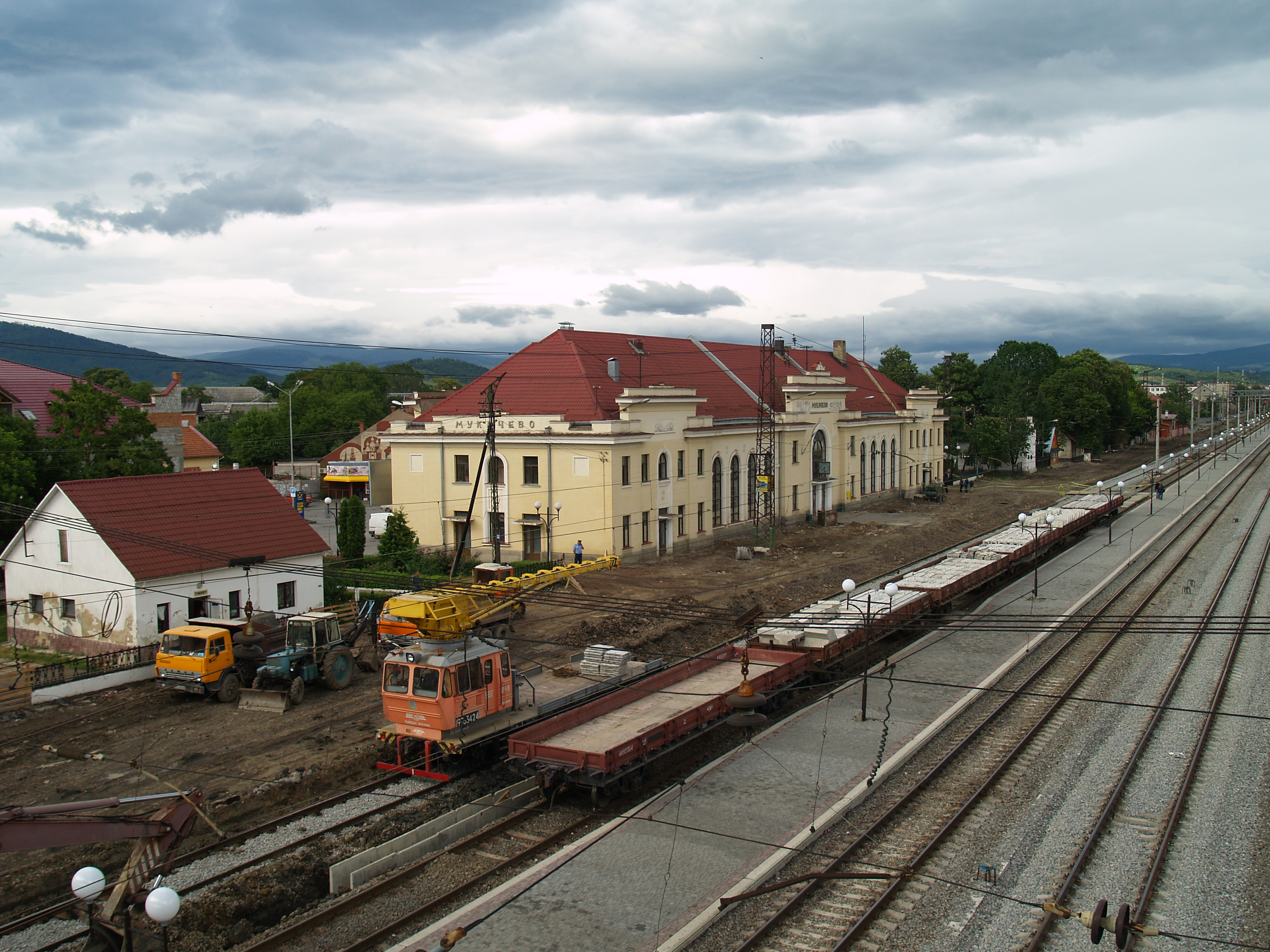 Станція Мукачеве під час реконструкції, 2010 рік